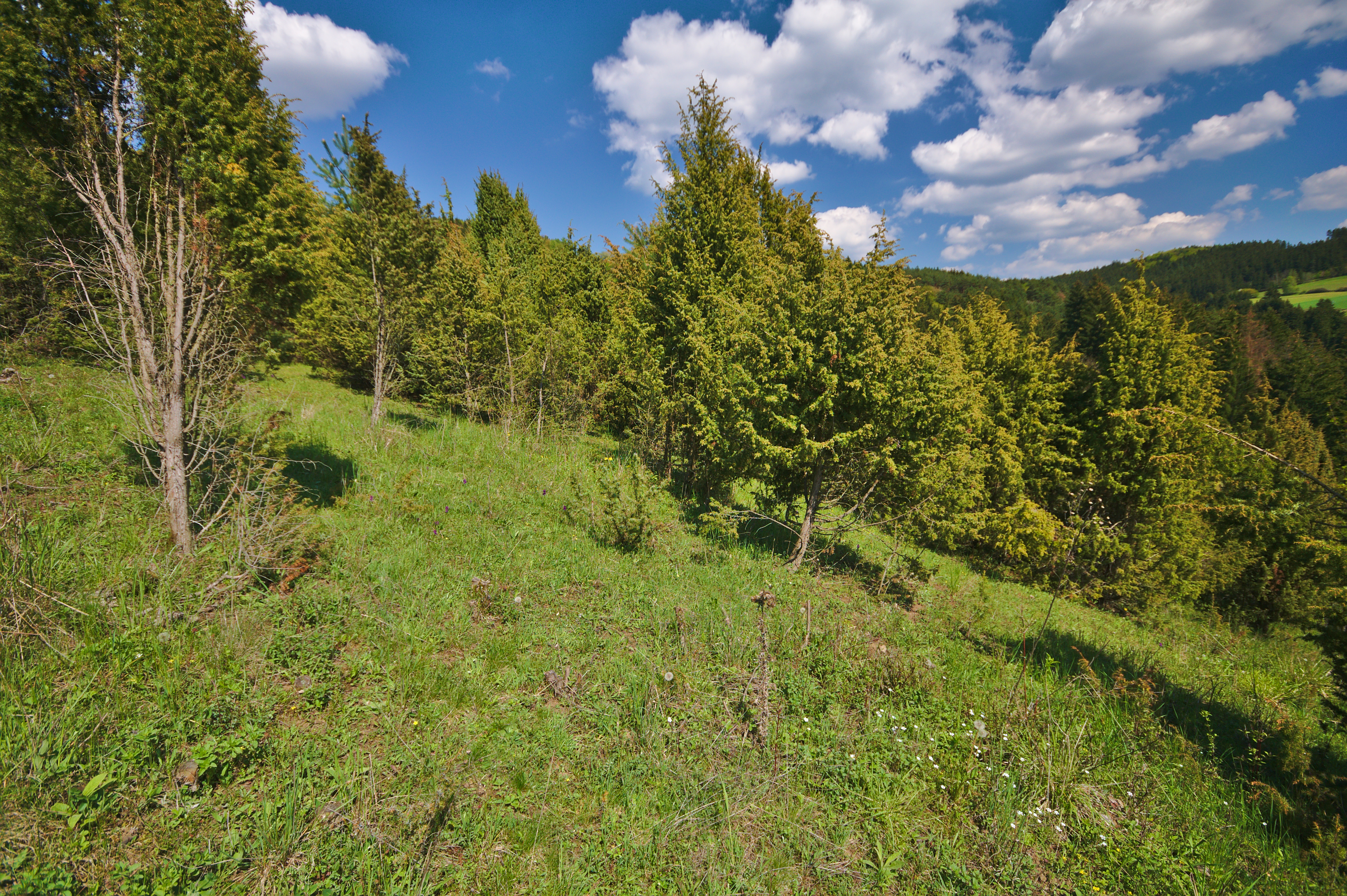 Národní přírodní památka Švařec, okres Žďár nad Sázavou